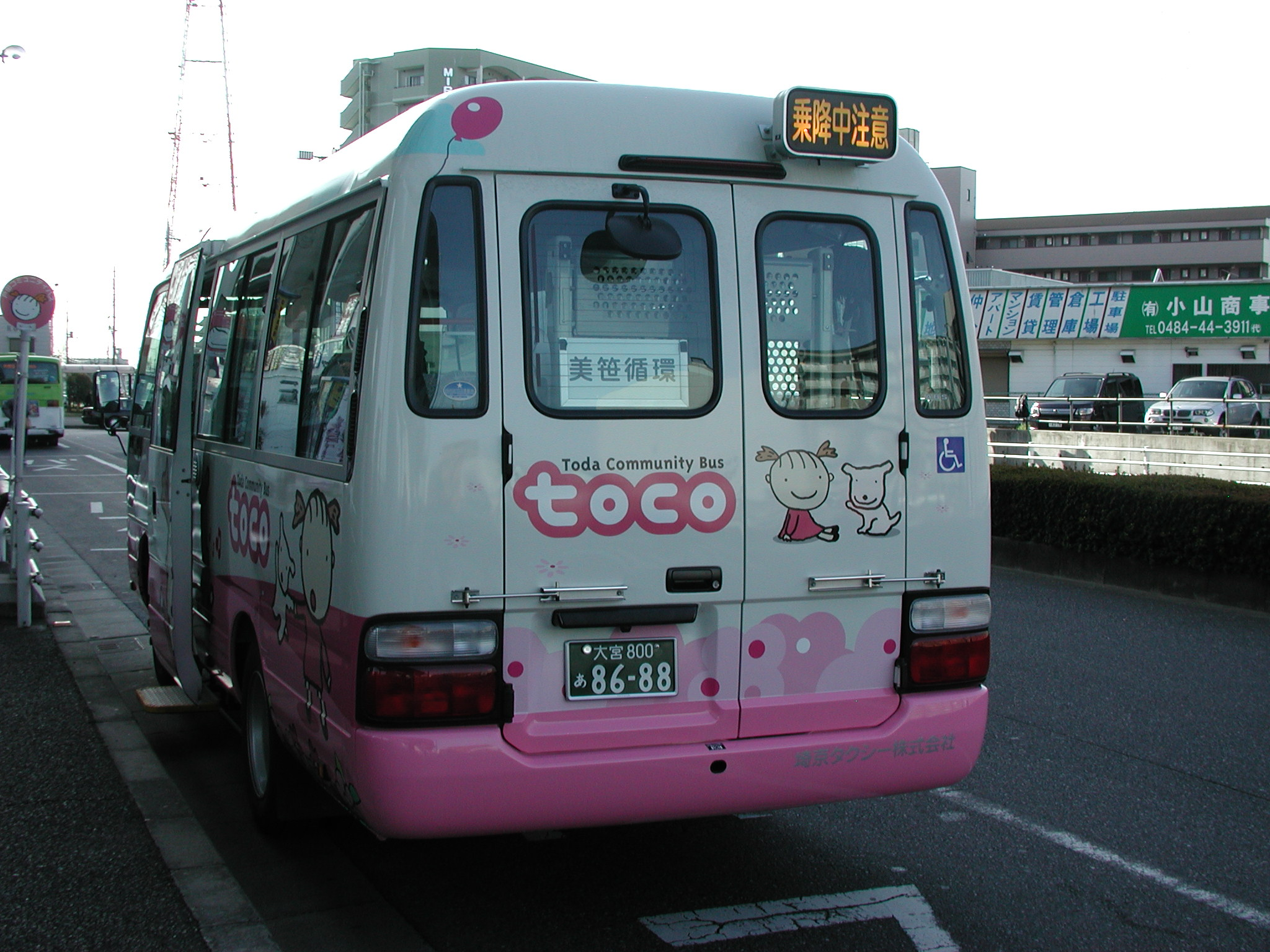 「戸田市コミュニティバス『toco』」美笹循環専用車両「花の公園（2代目）」（トヨタ・コースターウェルキャブ 標準LX=タイプIII(BDG-XZB40-VTPENT )/埼京タクシー所属）：後面 北戸田駅西口にて